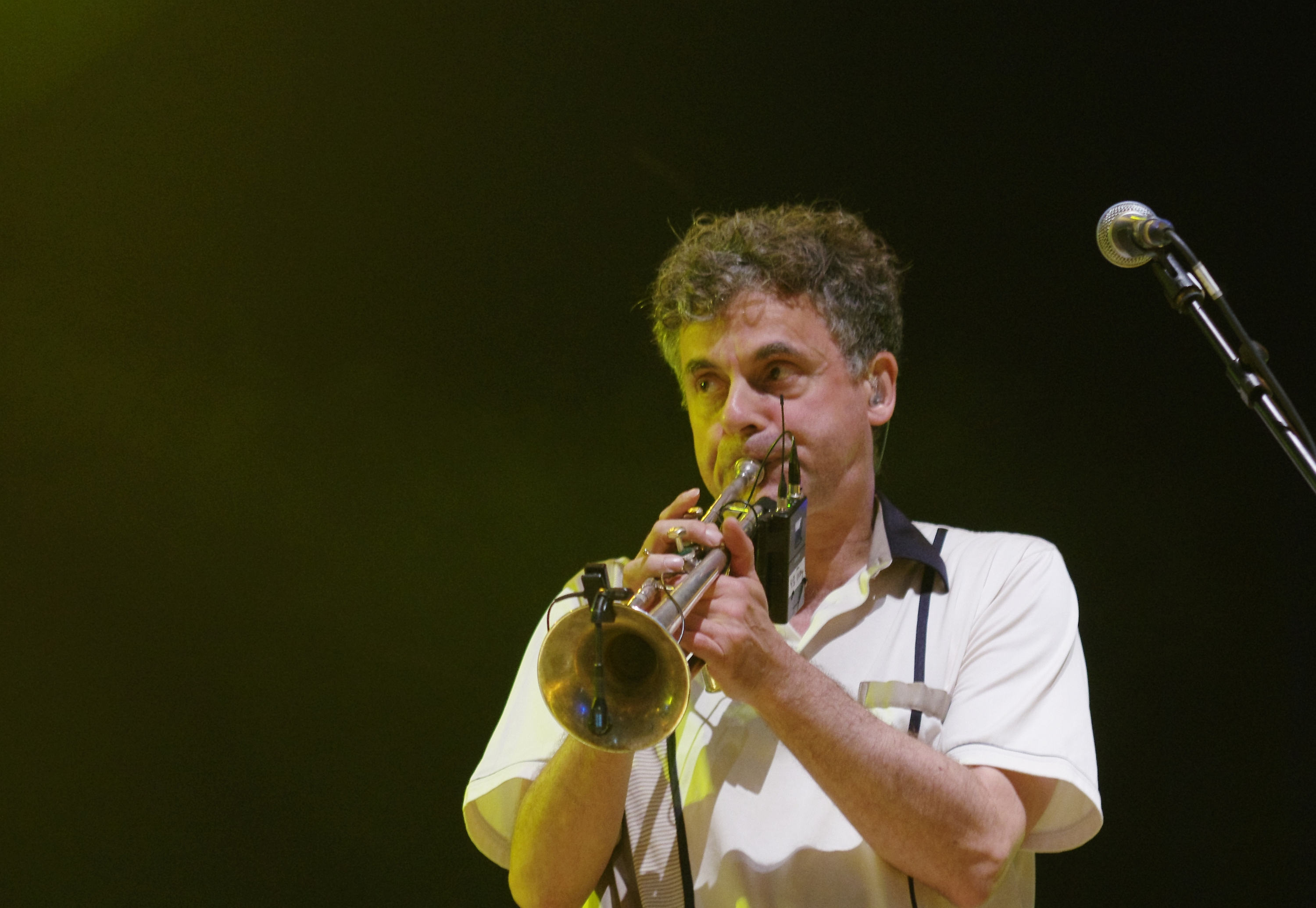 James (band) auf dem Haldern Pop Festival 2013. Hauptbühne. Besetzung: Tim Booth (Gesang) Jim Glennie (Bass) Larry Gott (Gitarre) Saul Davies (Gitarre, Violine, Percussion) Mark Hunter (Keyboards) Dave Baynton-Power (Schlagzeug) Andy Diagram (Trompete, Percussion)